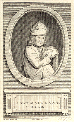 Ј. van Maerlant